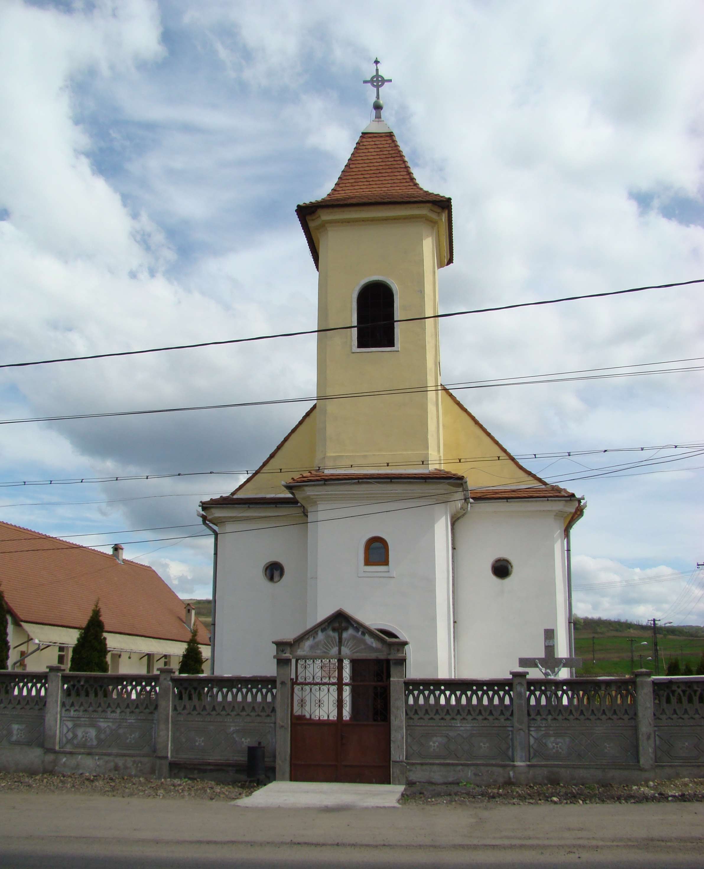 Biserica romano-catolică "Înălțarea Domnului", oraș Copșa Mică, județul Sibiu